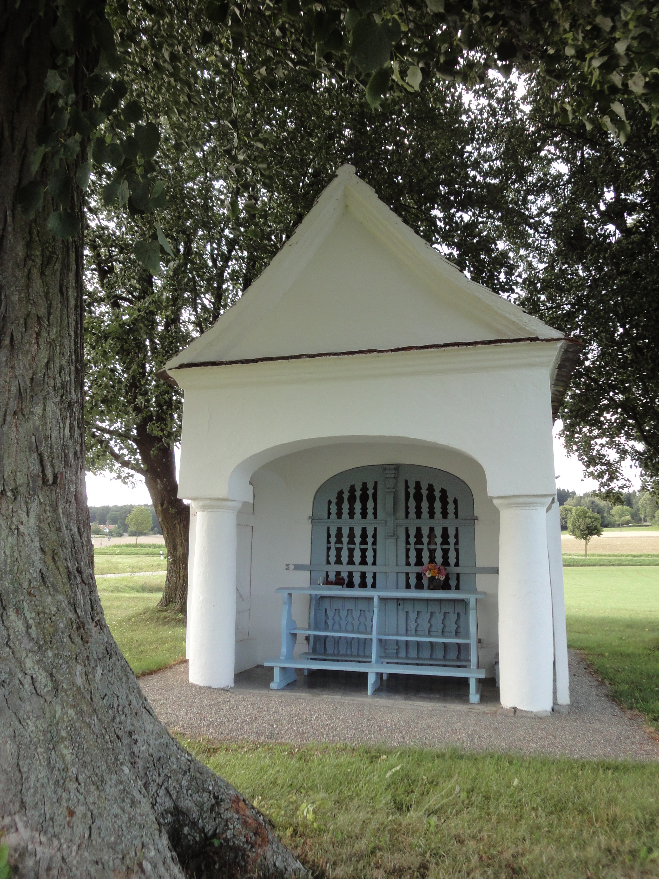 Feldkapelle Mariahilf, Angerfeld nahe Edenbergen